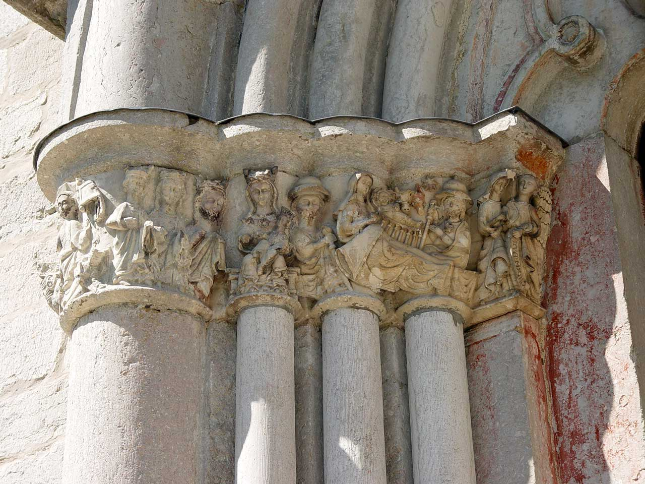 Bro kyrka (Gotland). Kapitelband am Südportal mit Szenen aus dem Leben Jesu: Kindheit, Auferstehung, Totenreich